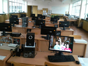 Кабинетите на ПГЕА са на една крачка от Космоса - крачката на Вашите мечти